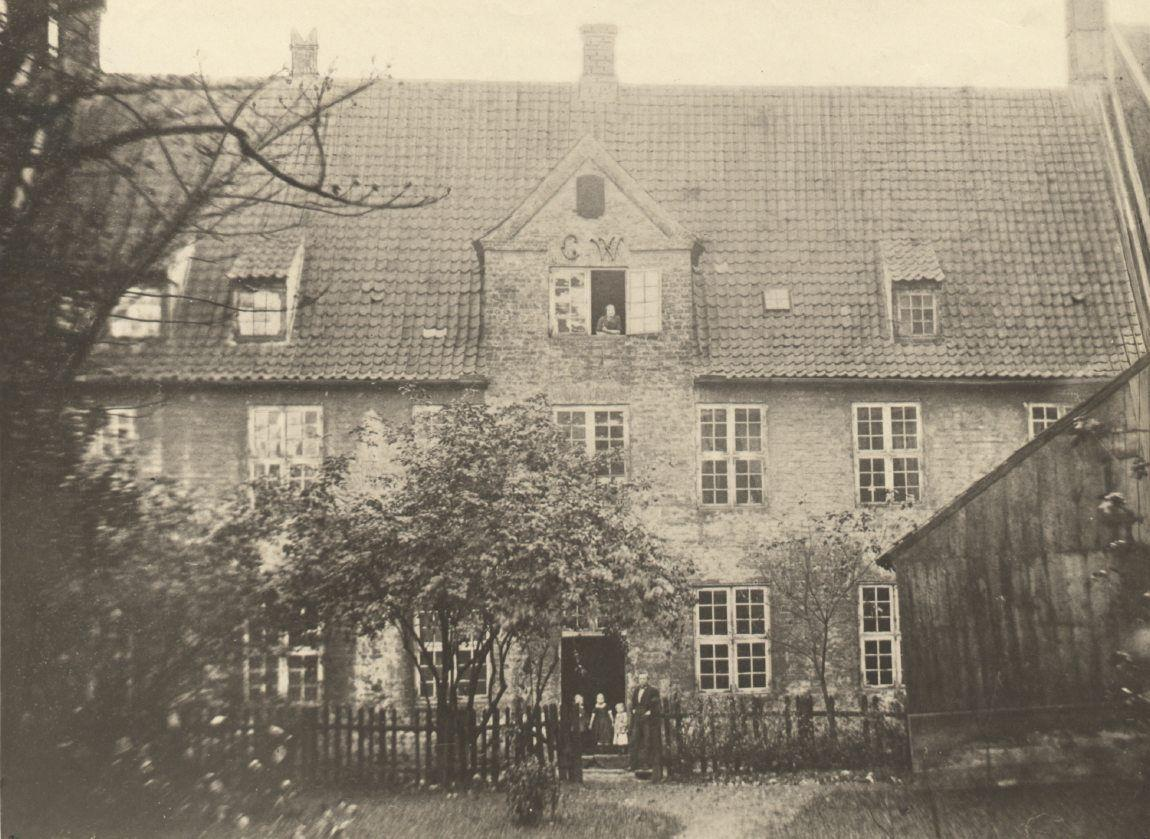 Collegium anno 1864